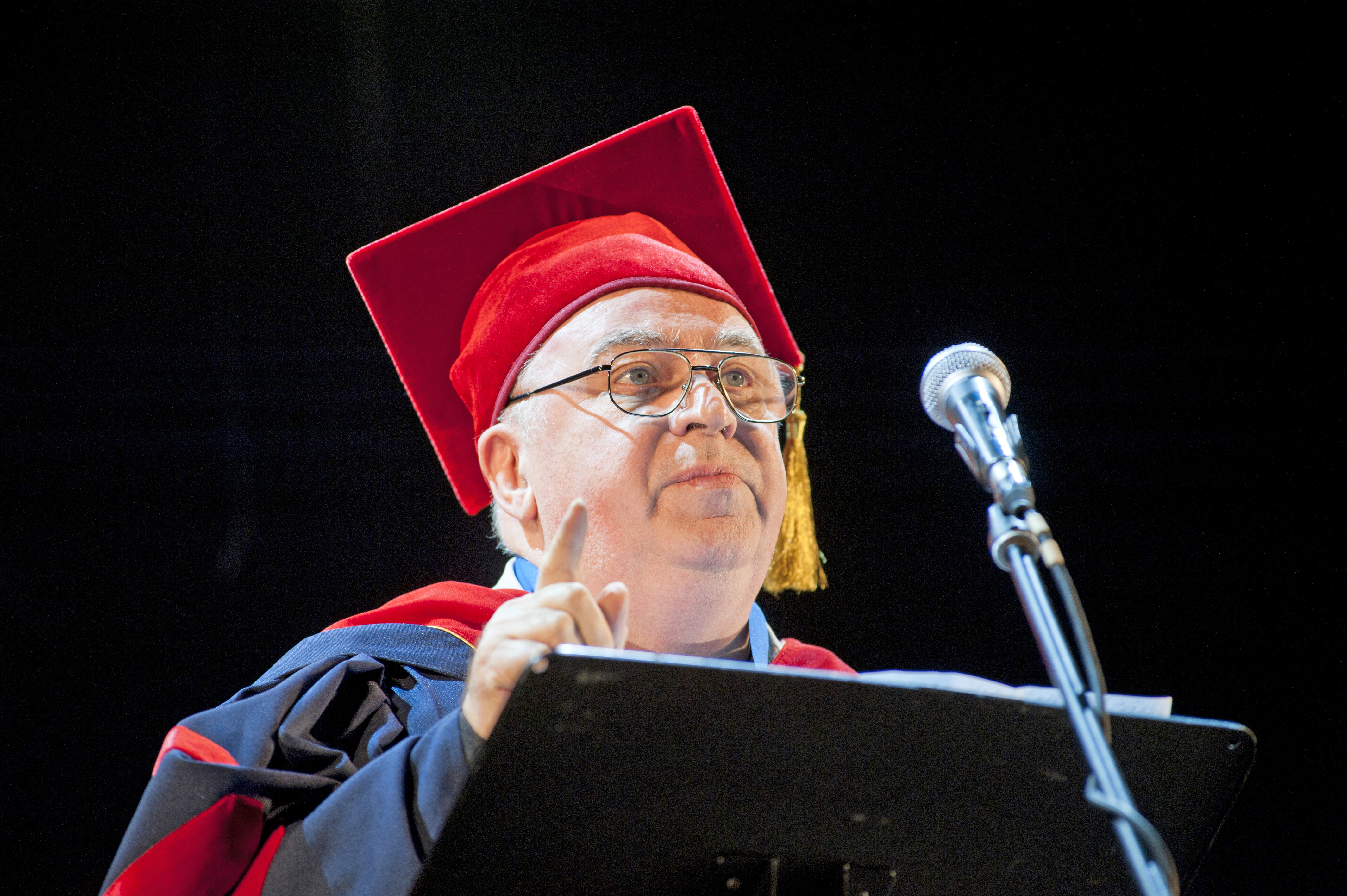 Писатель Андрей Королёв 13 октября 2016 года на процедуре присвения звания Почетного профессора Пермского университета.